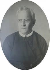 Achille Delaere (ur. 1868 w, zm. 1939) - belgijski duchowny rzymskokatolicki, redemptorysta.